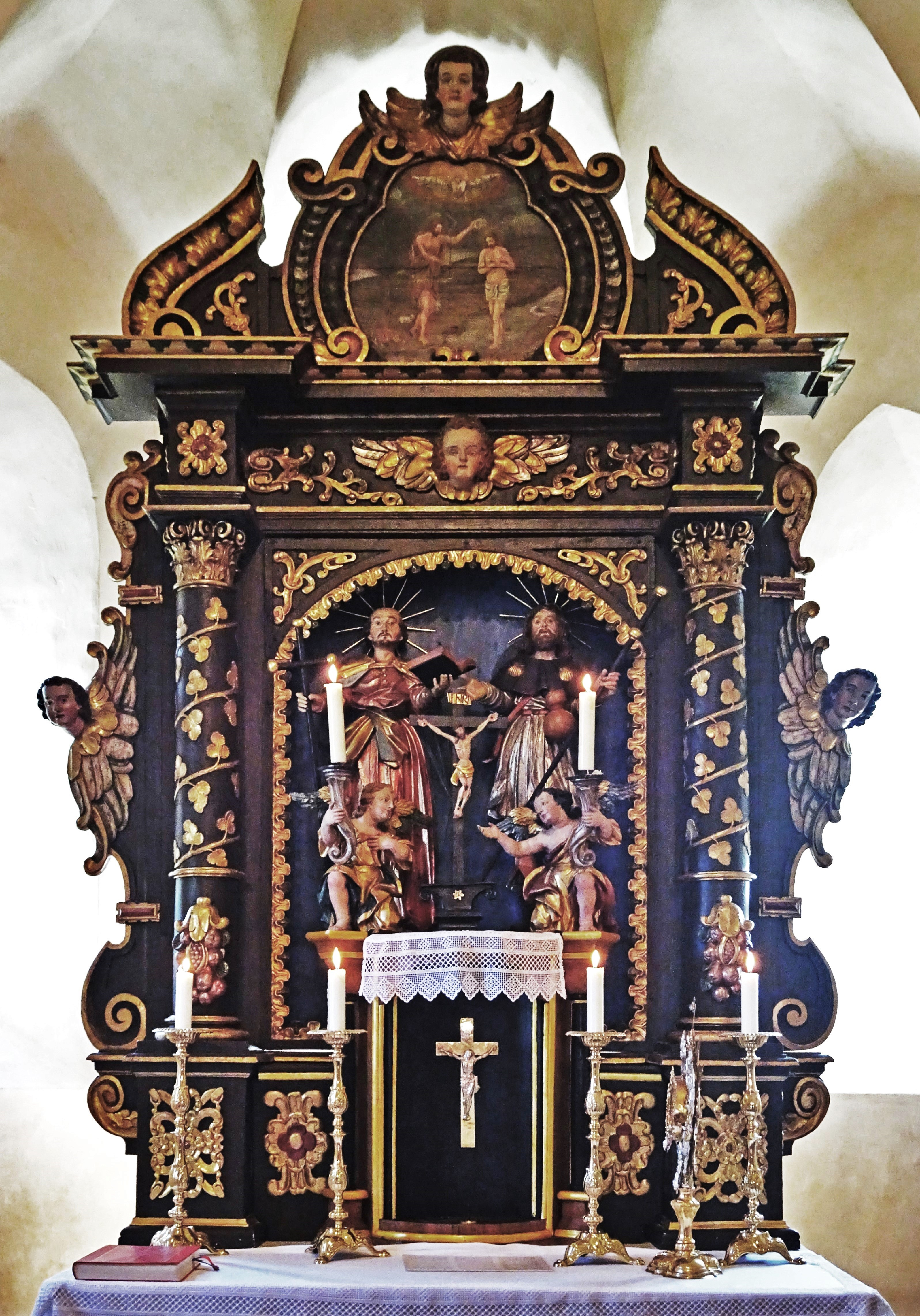 Kath. Filialkirche Hll. Philippus und Jakobus Briefelsdorf, der Hochaltar